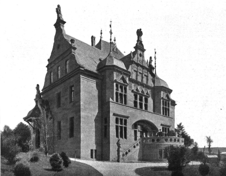 Villa Knorr, Heilbronn. Architekten: J. Vollmer & H. Jassoy, Berlin